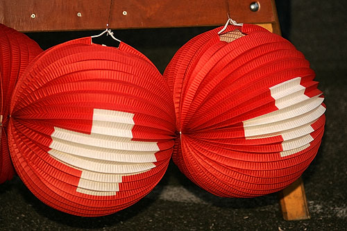 Reinach: "Zunft zu Rebmessern" verschenkt Kindern Lampions